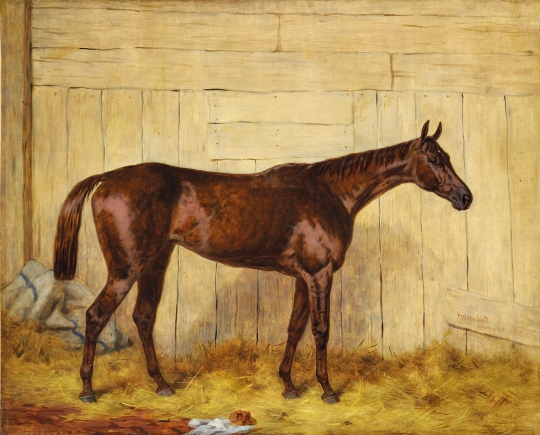 Harry Hall festménye a legendás magyar csodalovat, Kincsemet ábrázolja, a világhírű veretlen magyar telivért, aki pályafutása során összesen 54 versenyben győzedelmeskedett. Ez a mű nemcsak fontos festmény, hanem egyben kultikustárgy is, a Kincsem mítosz legfontosabb korabeli képzőművészeti relikviája. Kincsem nemcsak a magyarság ló szeretetének szimbóluma, hanem a megalkuvás nélkül kiharcolt sikernek és a legyőzhetetlenségnek is. sikereinek köszönhetően az Európa szerte csak „Hungarian Wonder”-nek nevezett magyar telivér méltán vált a lóversenyzés történetének legnagyobb legendájává.